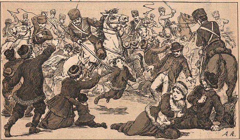 Nas ruas de S. Petersburgo: Cossacos e mais forças do Czar matando e chicoteando homens, mulheres e crianças. Indignado, no auge do desespero, o povo gritava para os soldados: — Covardes! Eis a primeira victoria dos Grãos-Duques! (tradutor do google:) Ilustração de Angelo Agostini. A revista satírica “O Malho”, nº 128, 25/02/1905. Angelo Agostini nunca esteve em São Petersburgo e até na Rússia. Ele não viu "Domingo Sangrento". Isso é imaginação.